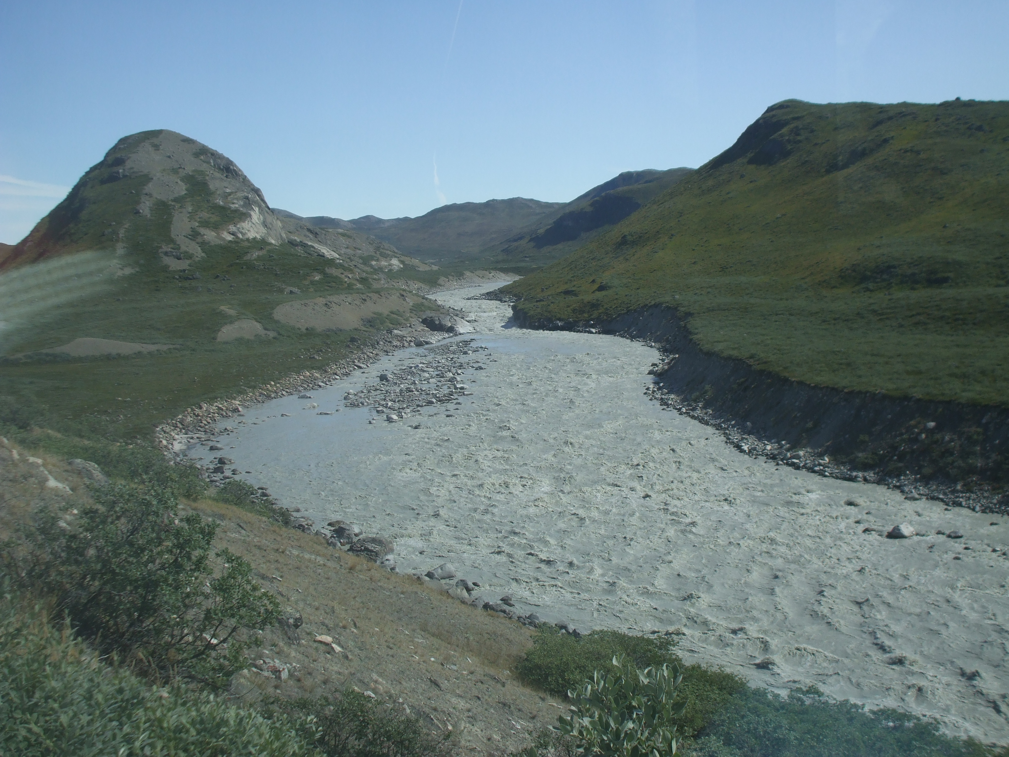 Rivère silicatée Sugarloaf Groenland 2009 Expédition ACarré